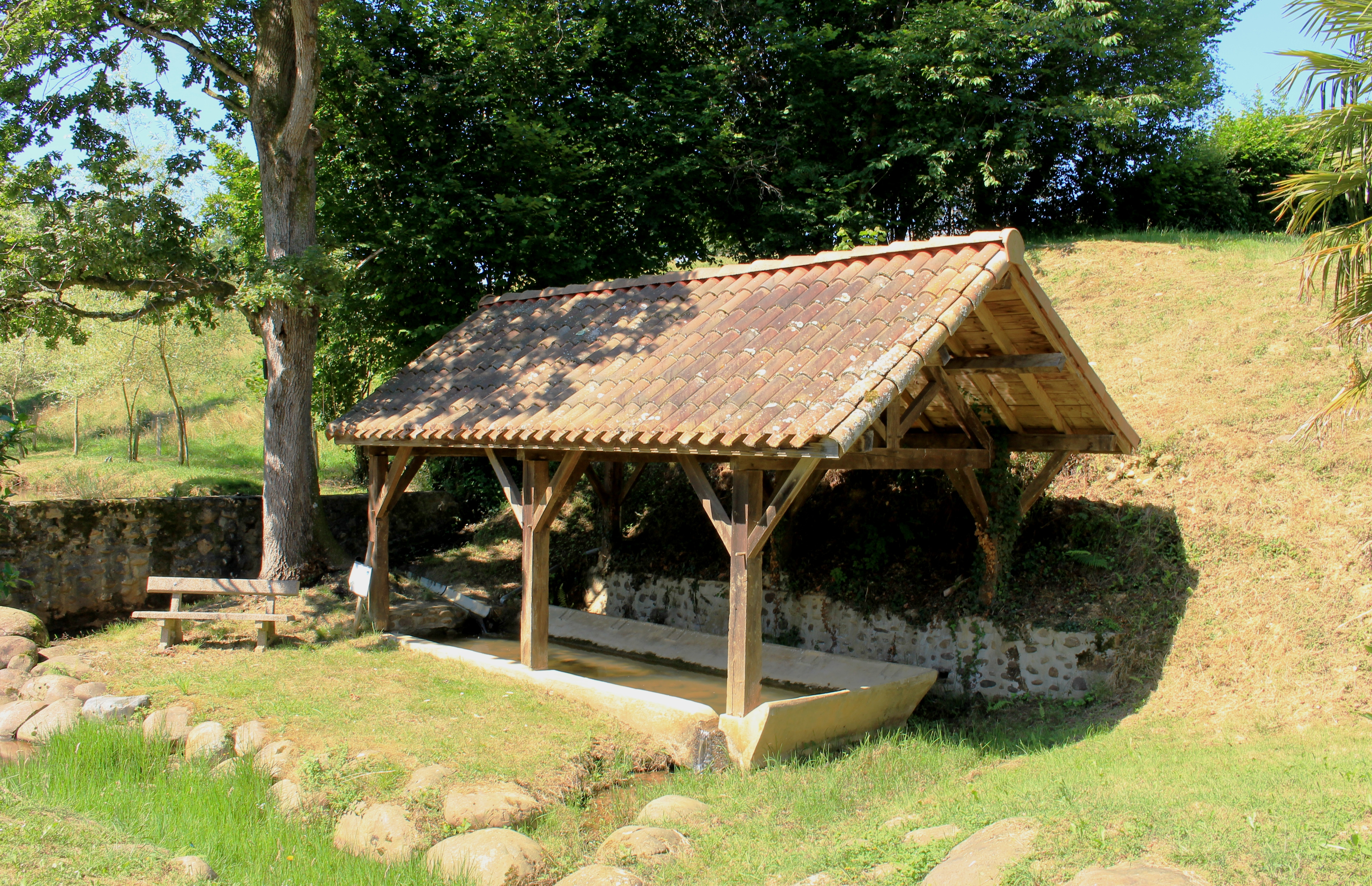 Lavoir de Bégole (Hautes-Pyrénées)